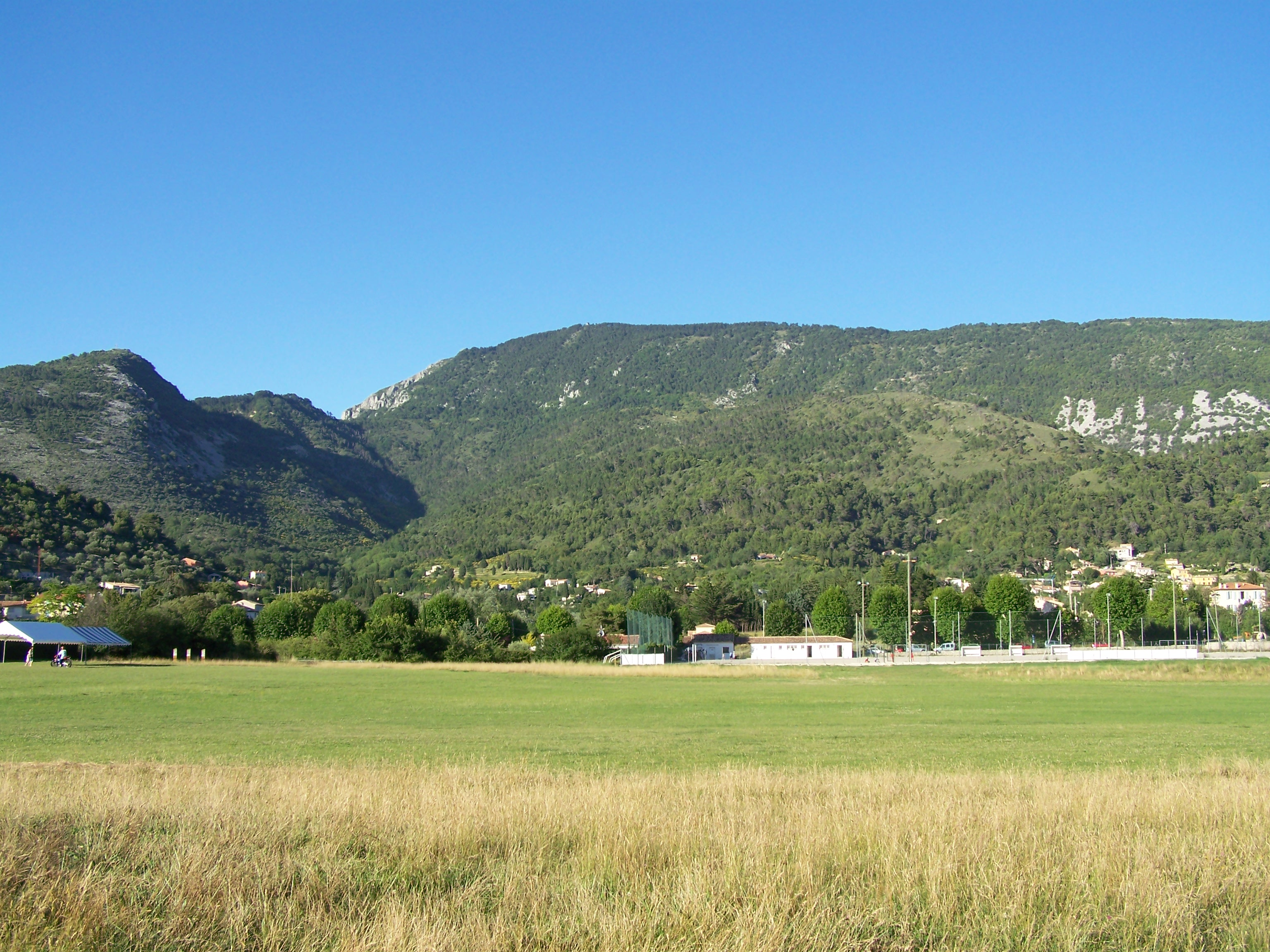 Panorama oriental du village de Levens (Alpes-maritimes, France), montrant la partie nord des "grands prés" avec la route départementale n°19 et en arrière les monts Castellar (1137m, à gauche) et Férion (1412m à droite)